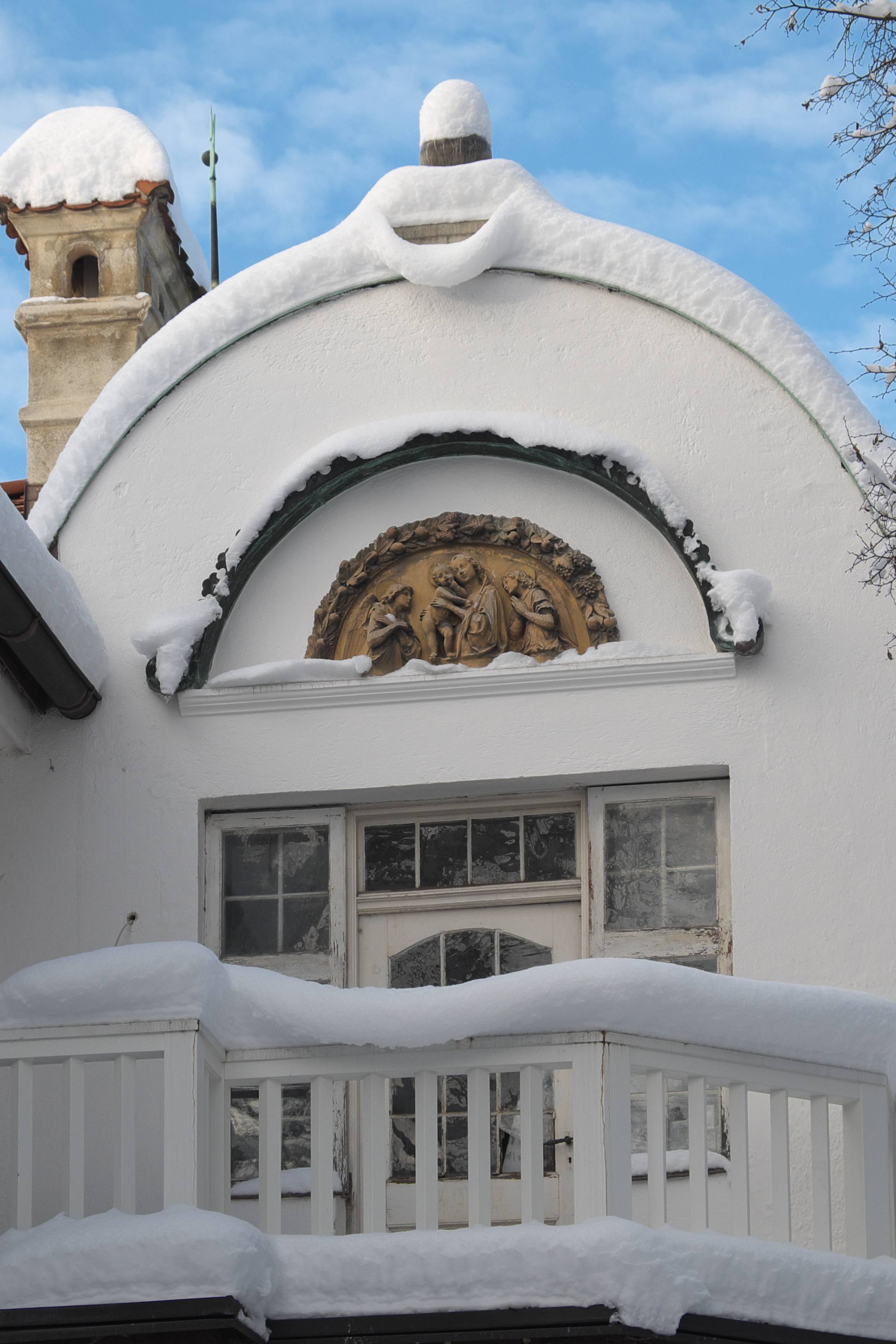 Villa in der Floßmannstraße 37 in Obermenzing im Stadtbezirk Pasing-Obermenzing in München (Bayern/Deutschland), von 1893/94, Relief Madonna mit Kind und Engel